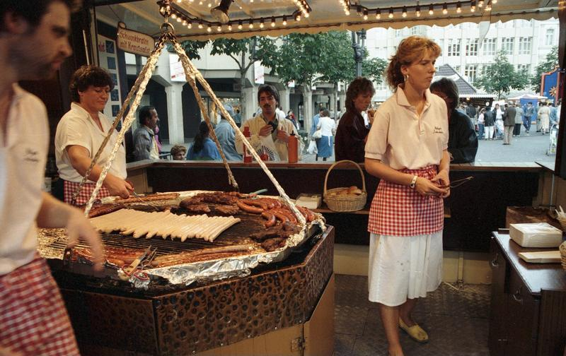 Juni 1988 Bonn - Innenstadt, "Selbsthilfetag" - Veranstaltung auf dem Münsterplatz Grillbude - Grillstand